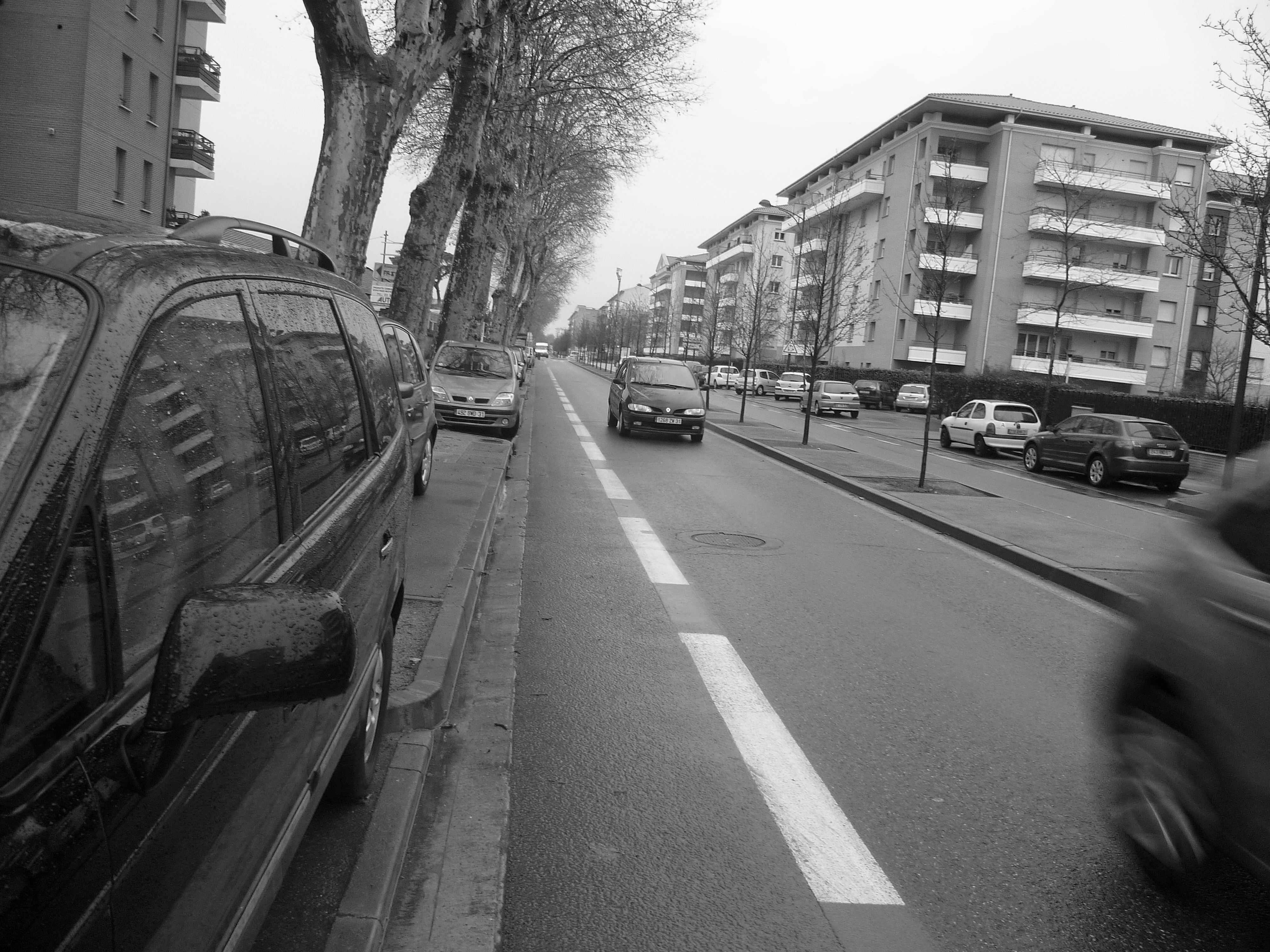 Toulouse (Haute-Garonne, France) : Avenue de Lombez.